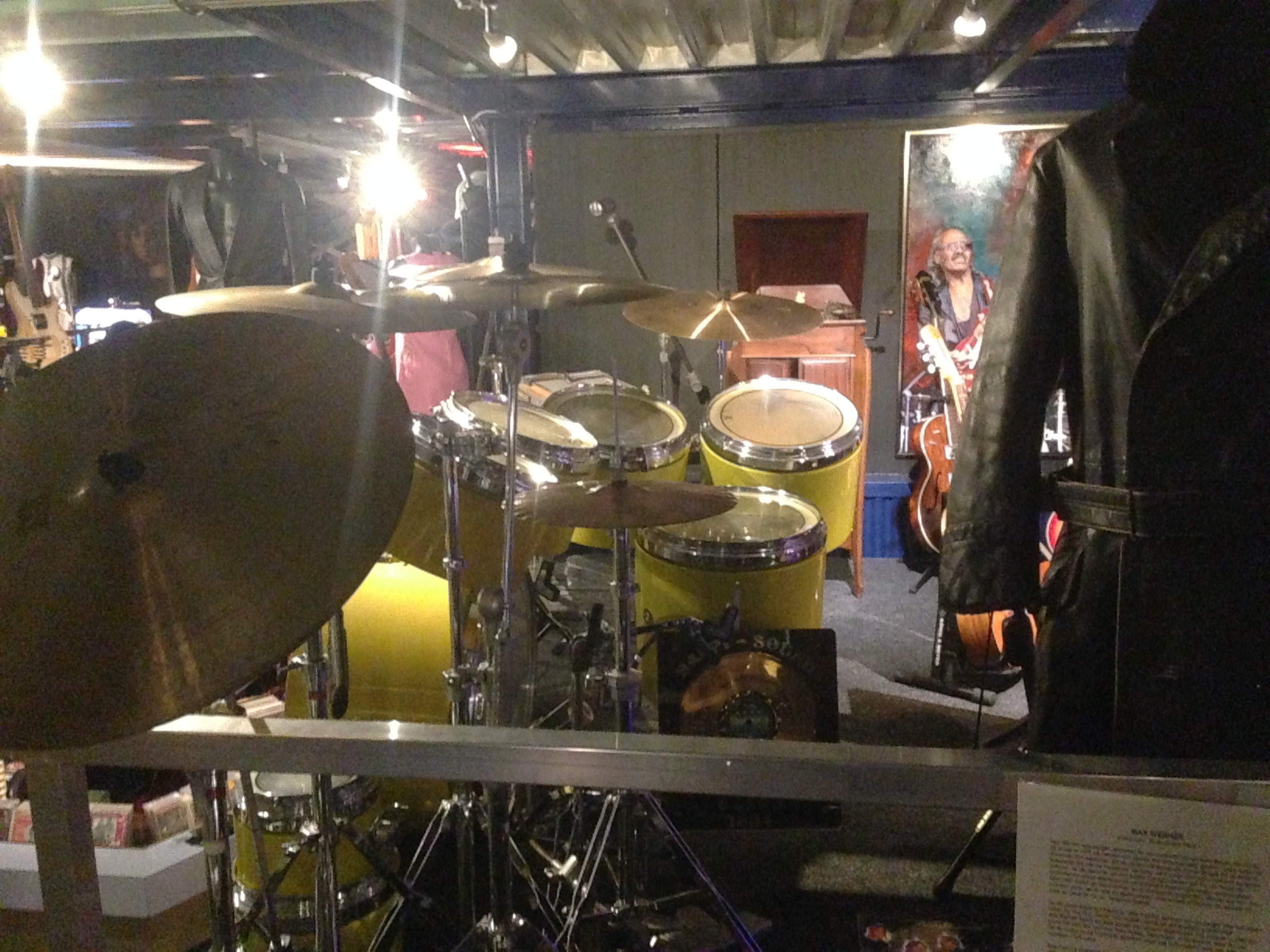 Museum RockArt, Hoek van Holland, Netherlands